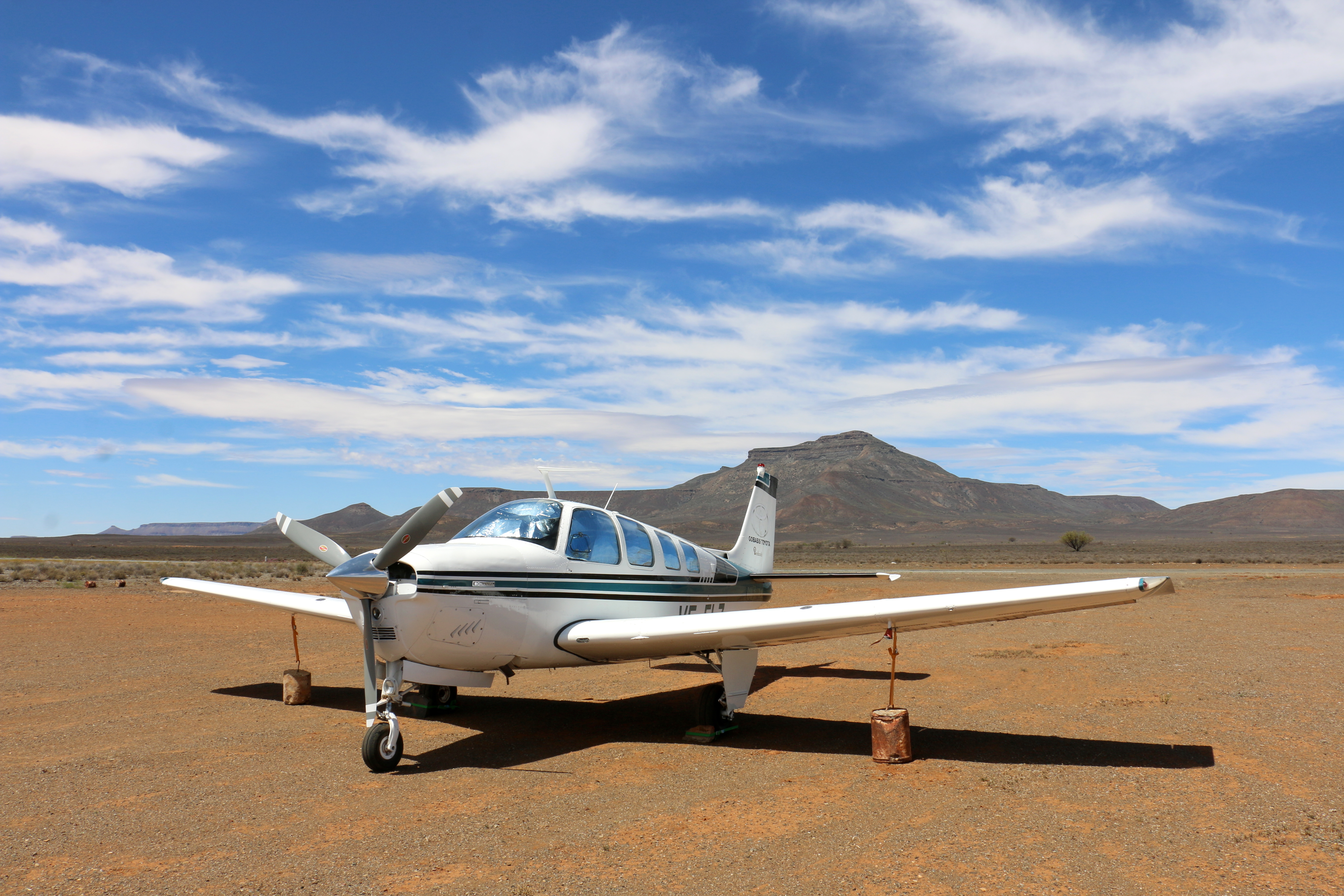 Calvinia Flugfeld (2016)